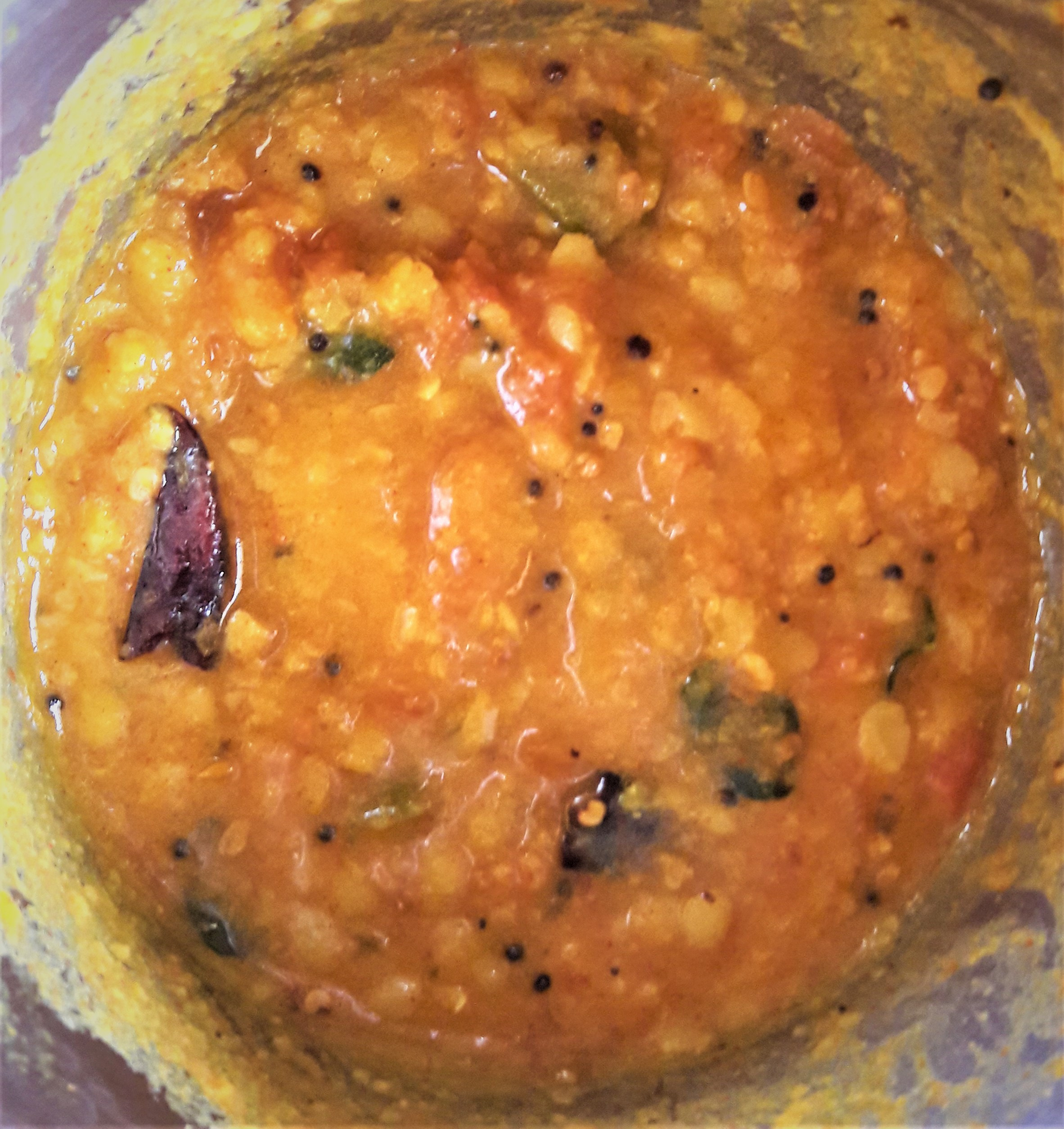 టమాట పప్పు